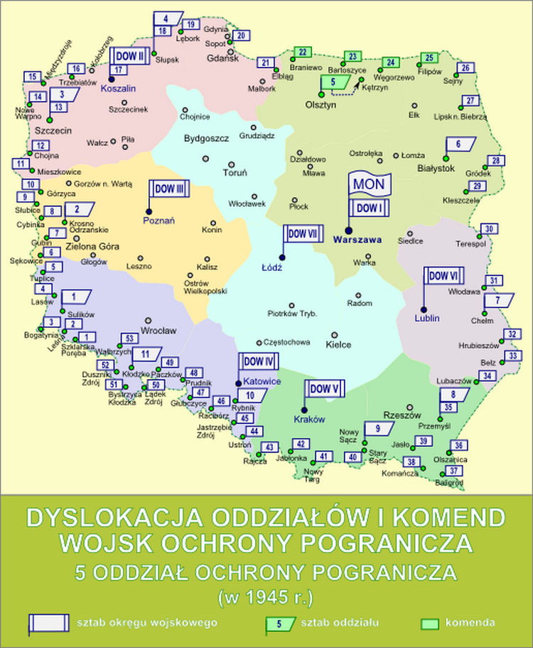 Dyslokacja oddziałów i komend Wojsk Ochrony Pogranicza - 5 Oddział Ochrony Pogranicza w 1945 r.